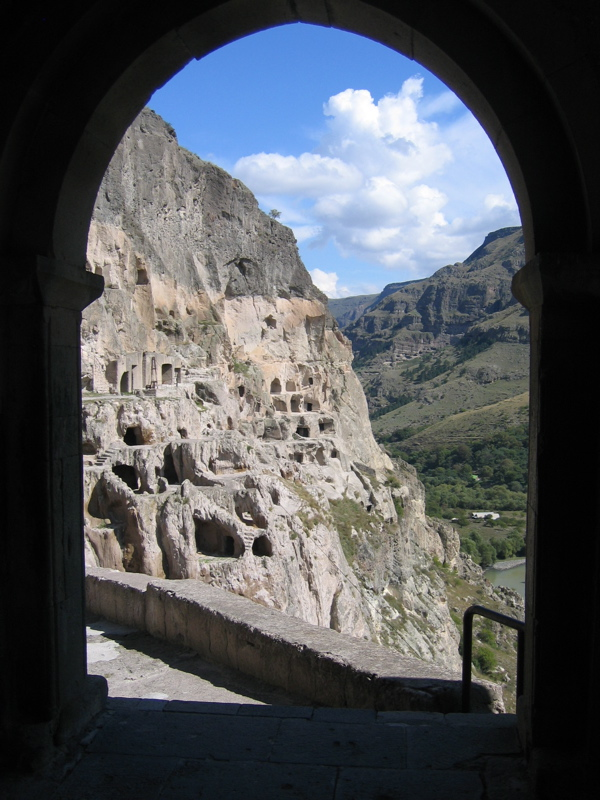 Vardzia cave city in Georgia